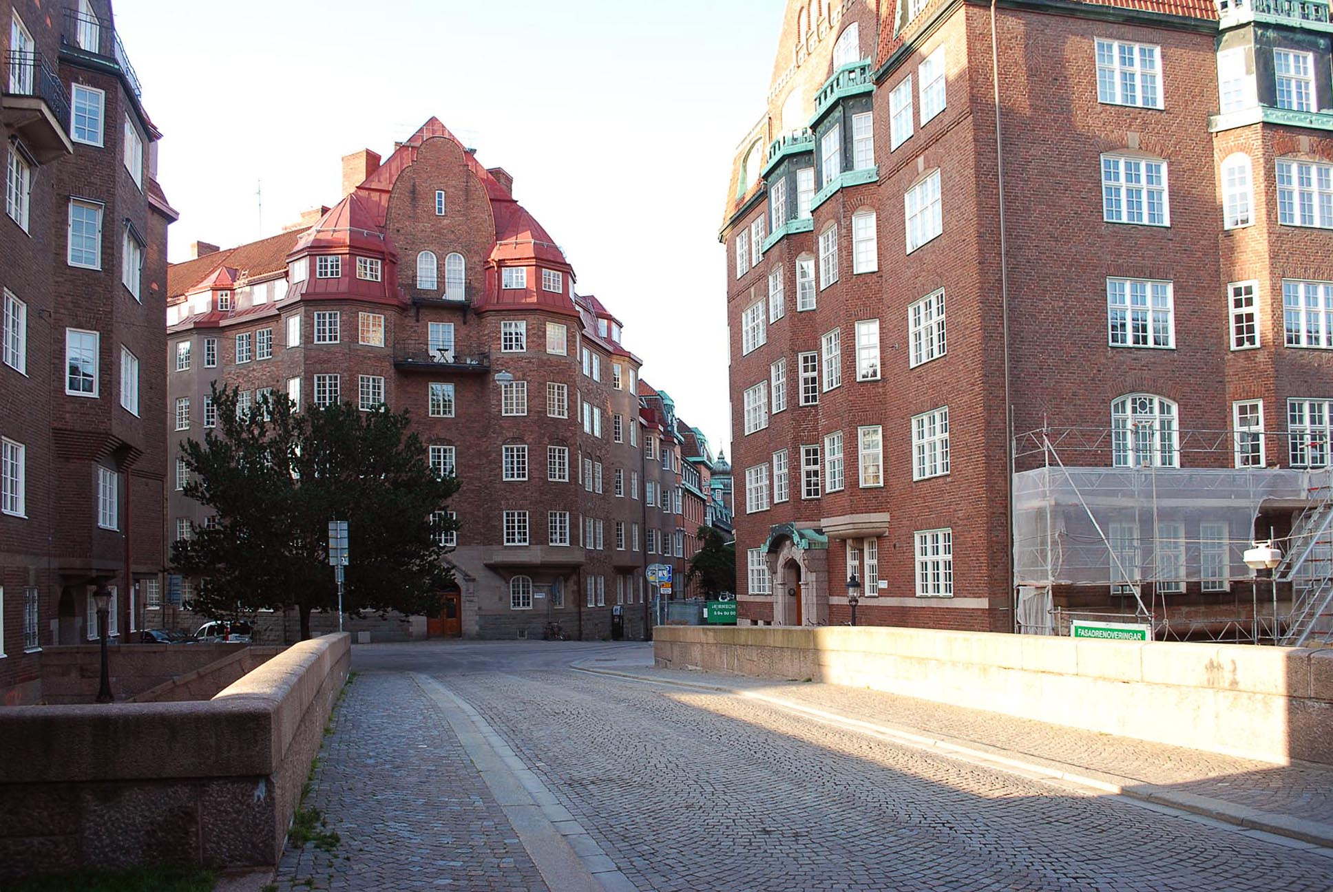 Eriksbergsgatan i Stockholm, viadukten över Runebergsgatan. Eriksbergsgatan 12 Fasader de Frumerie och Sundstrand, Planer Axel Bergman. byggherre / NJ Bengtsson